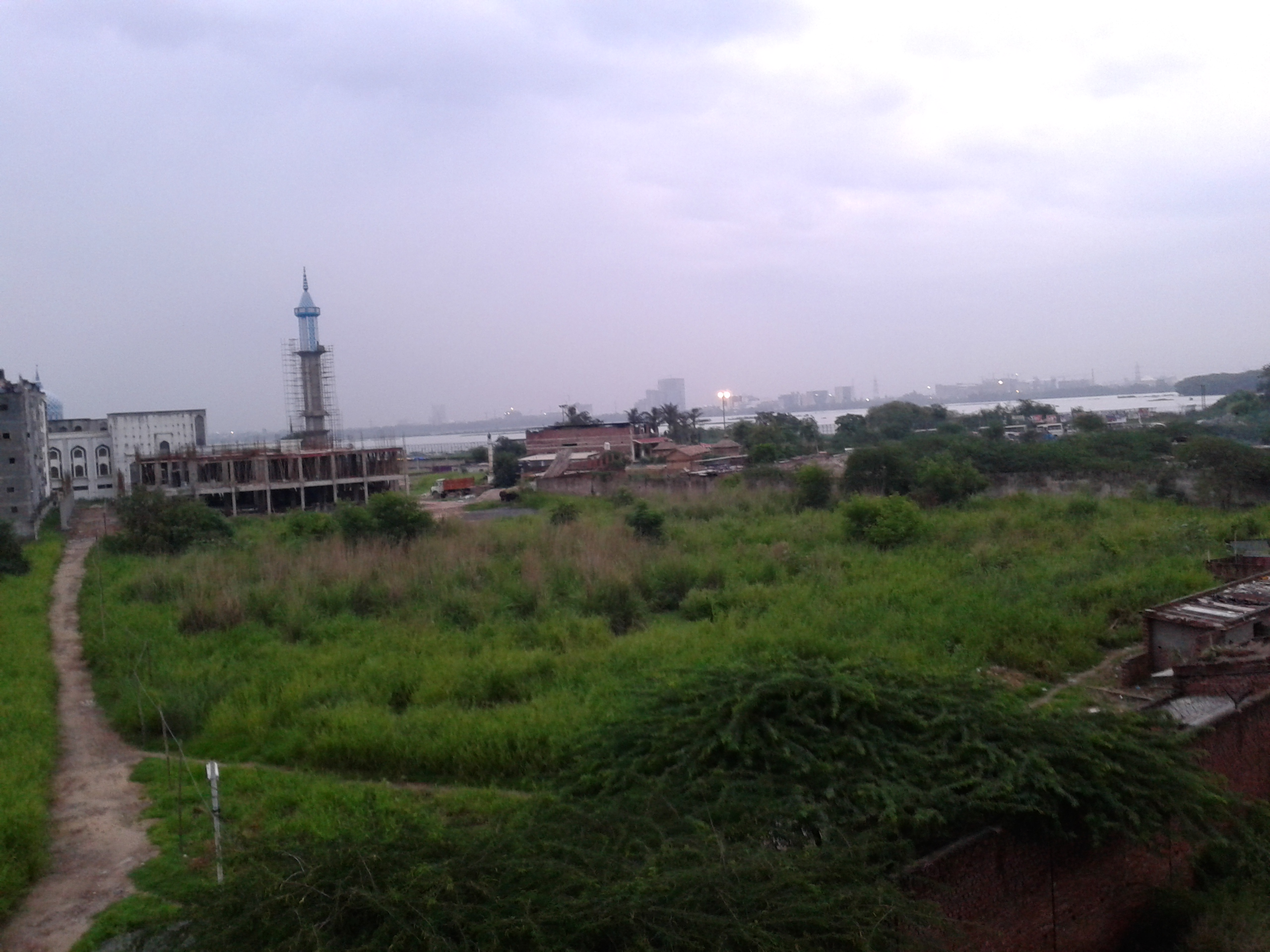 യമുന നദി ഡല്‍ഹിയില്‍ നിന്നുള്ള വിദൂര കാഴ്‌ച